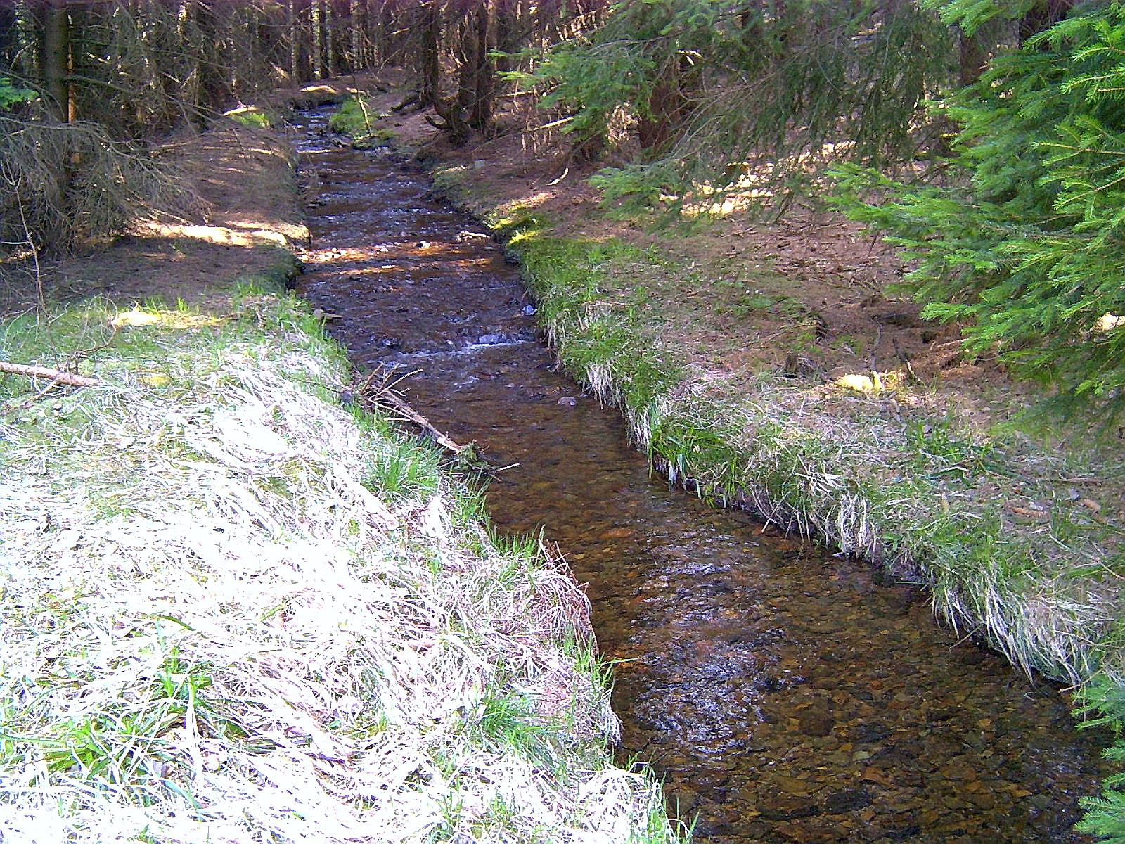 Der Wormsgraben westlich des Glashüttenweges